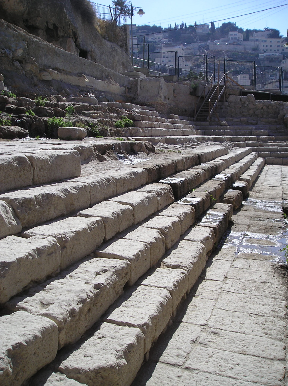 Pool of Siloam - Jerusalem (Photo: Abraham, September 2005)